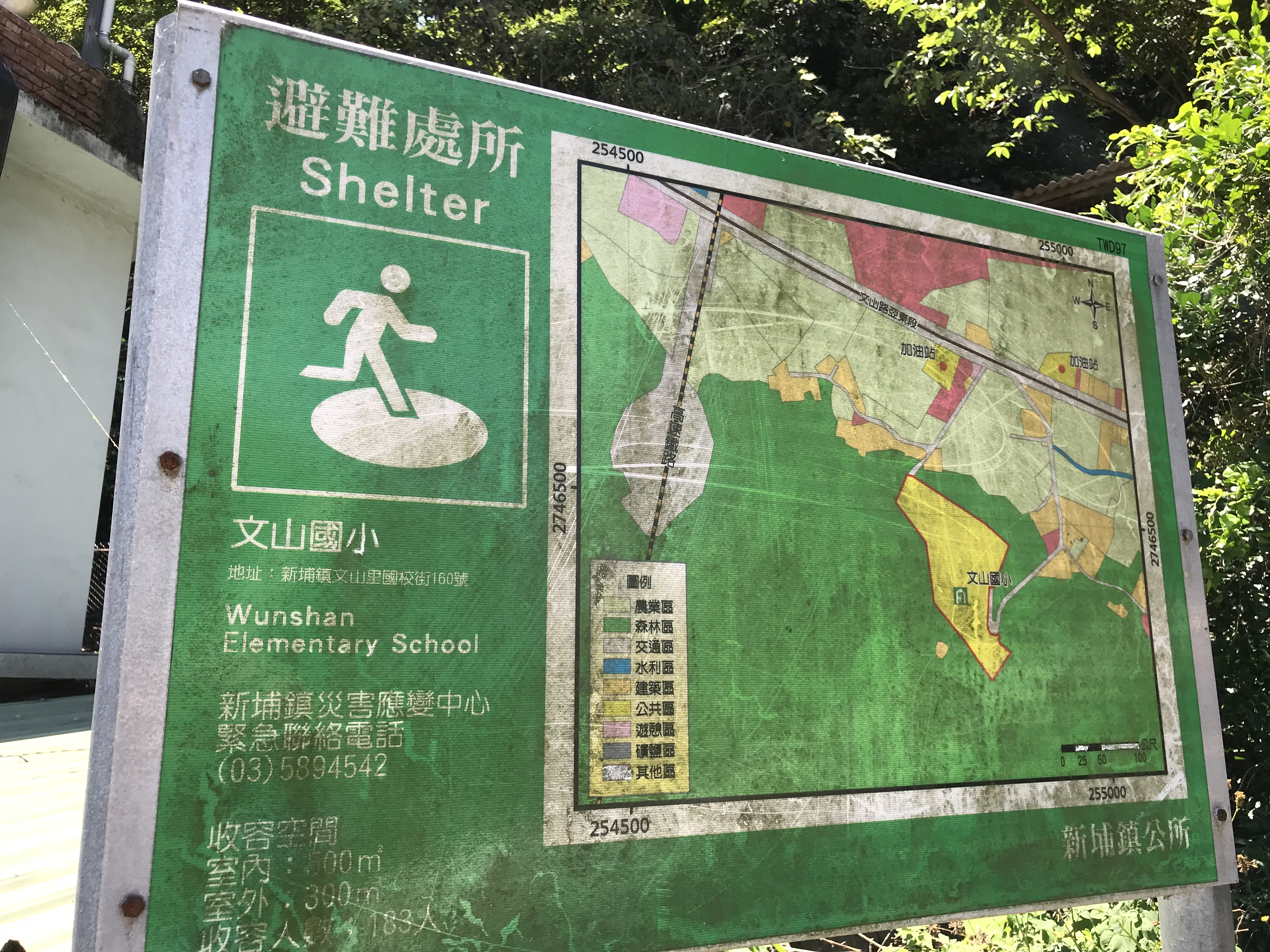 中文（台灣）: 新埔鎮文山國小避難指示牌